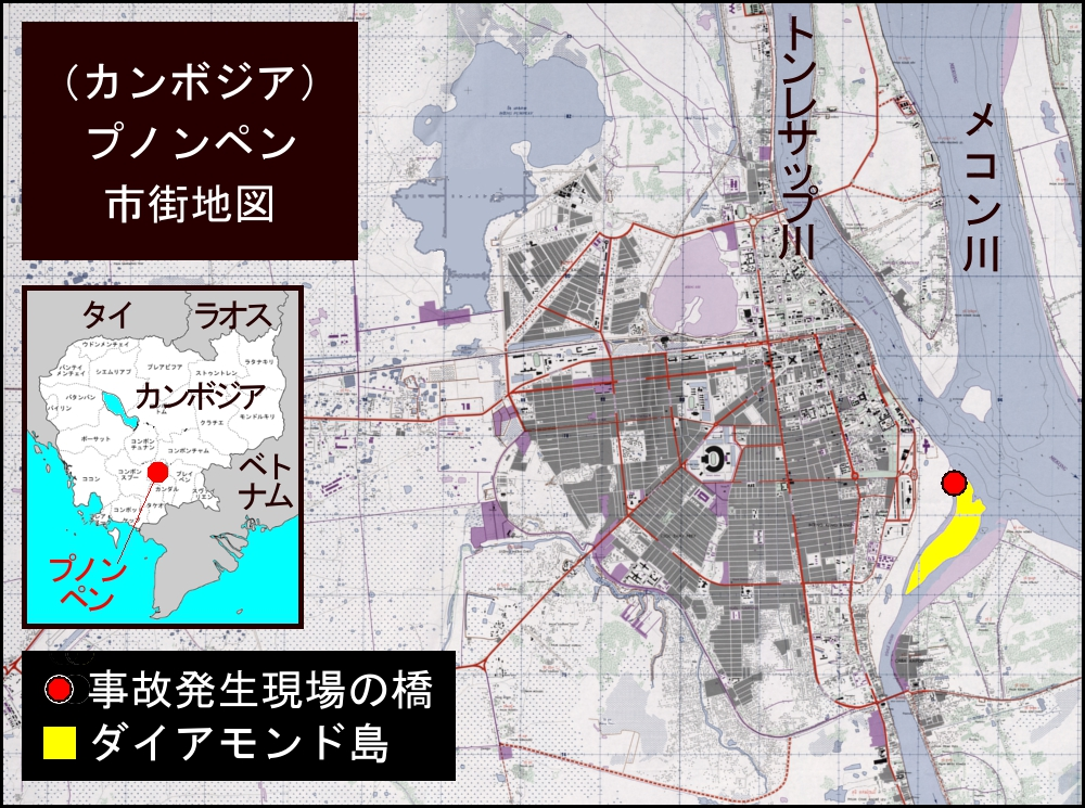 2010年11月22日の夜、 カンボジアの首都プノンペンの水祭りで起こった、将棋倒し事故の地図です。